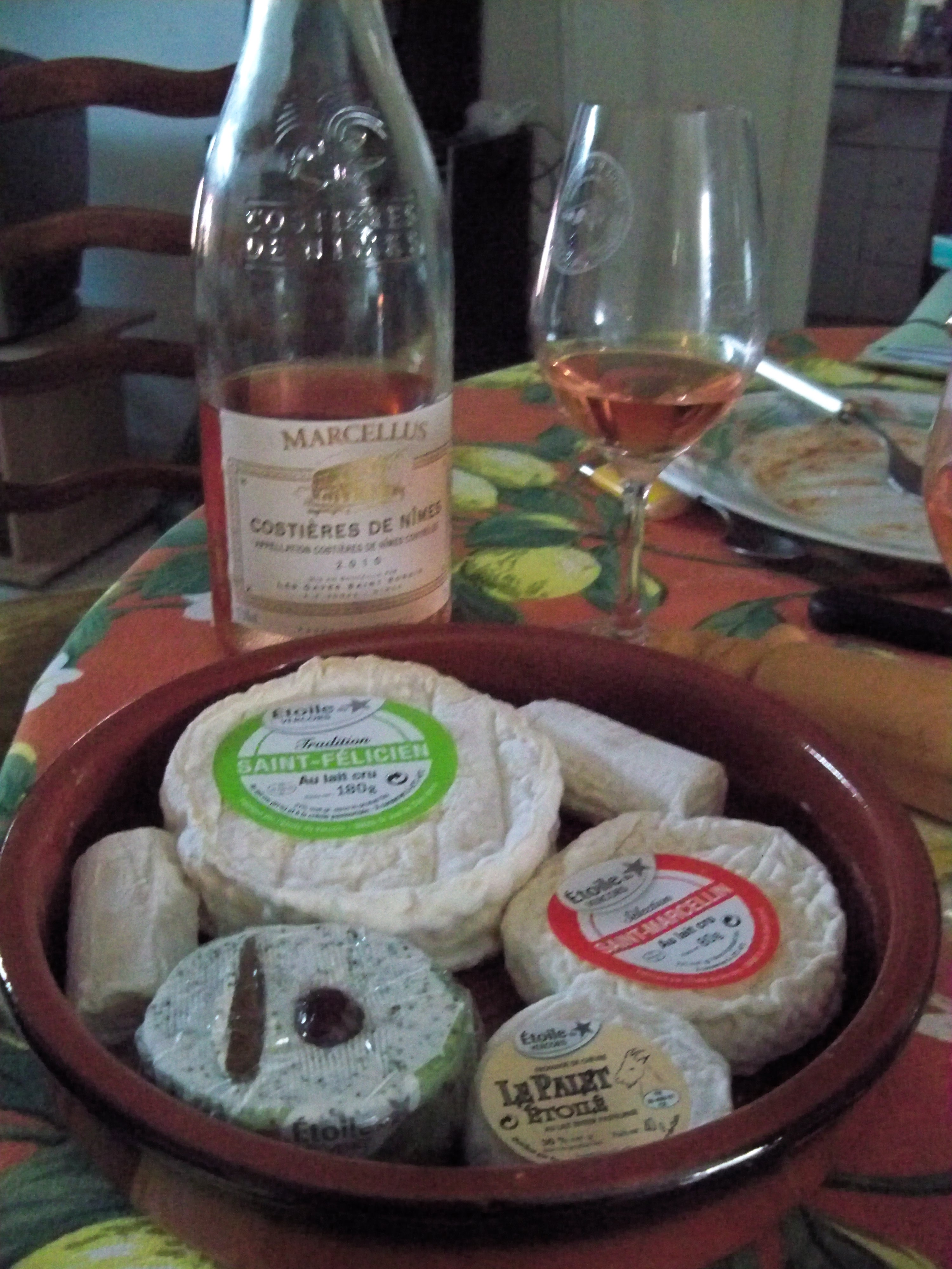 Plateau de fromages de chèvres